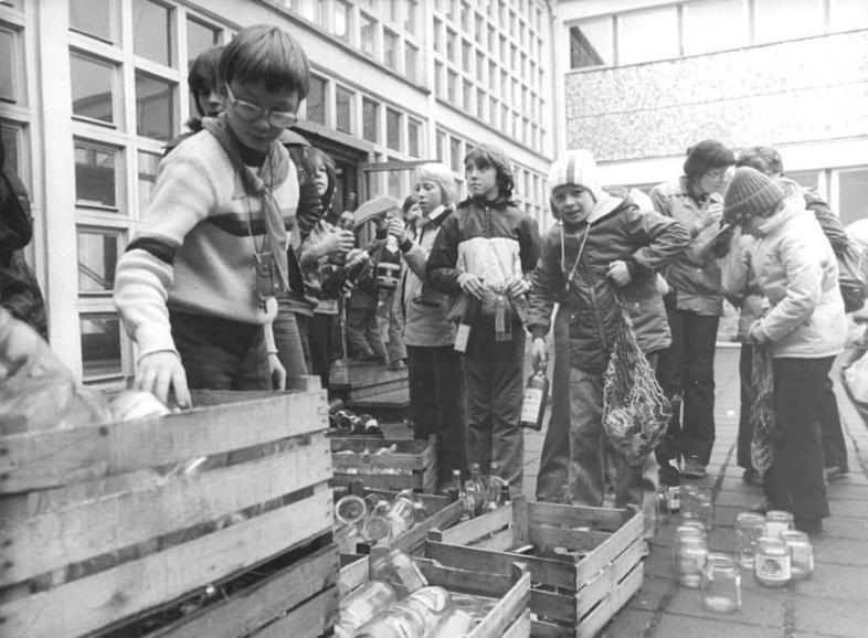 ADN-ZB-Schaar-19-12-79-Bez.Suhl: Solidarität - Ihre feste Verbundenheit mit den Kindern Kampucheas bekundeten rund 2 000 Pioniere und Schüler aus vier Schulen von Zella-Mehlis. Die Jungen und Mädchen dieser Schulen sammelten bereits zum dritten Mal Altstoffe, deren Erlös der Aktion "Helft den Kindern Kampucheas" zugute kommt."